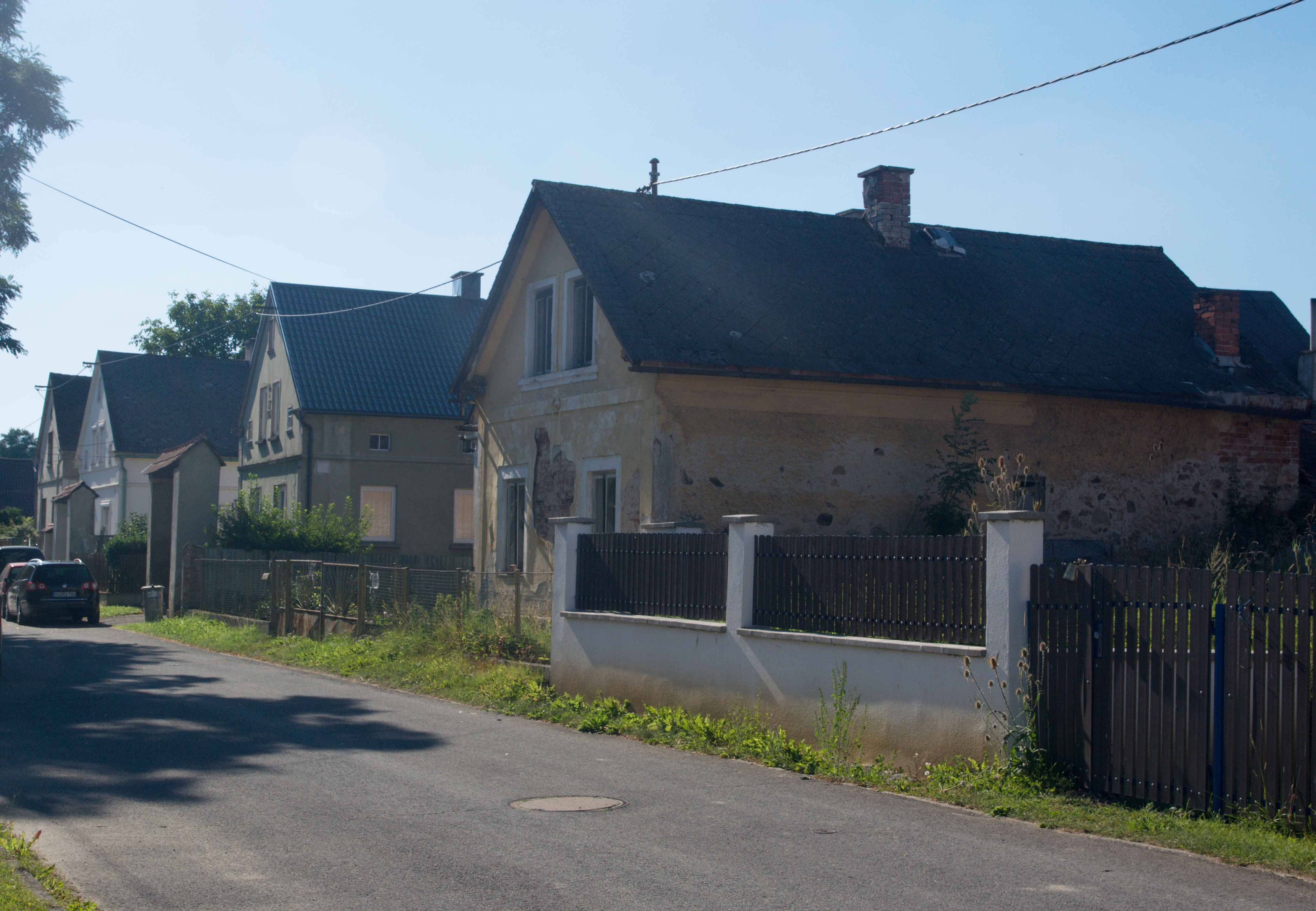 Mchov Hlavní ulice